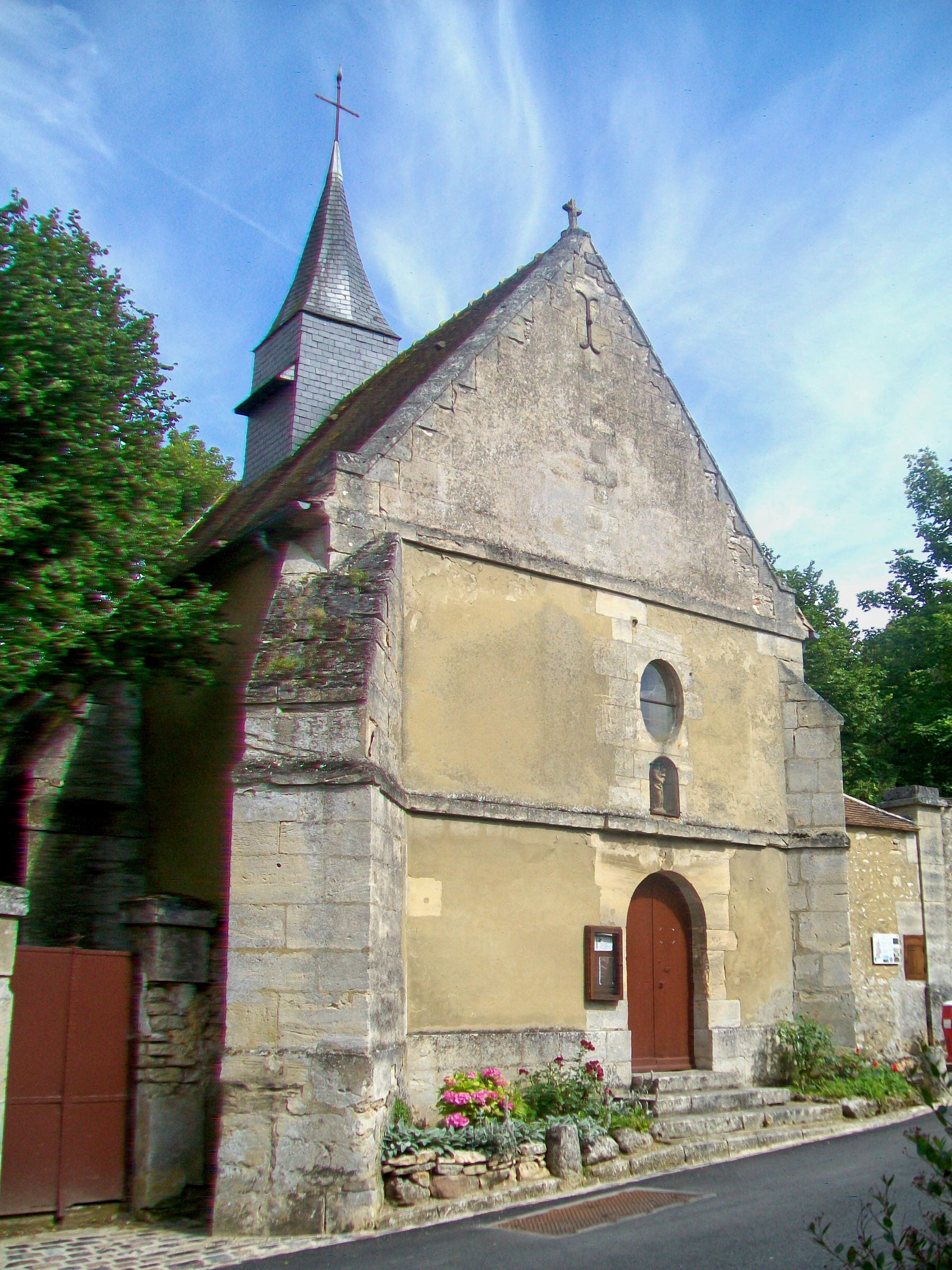 La chapelle Sainte-Marguerite, façade occidentale, depuis le nord-ouest.